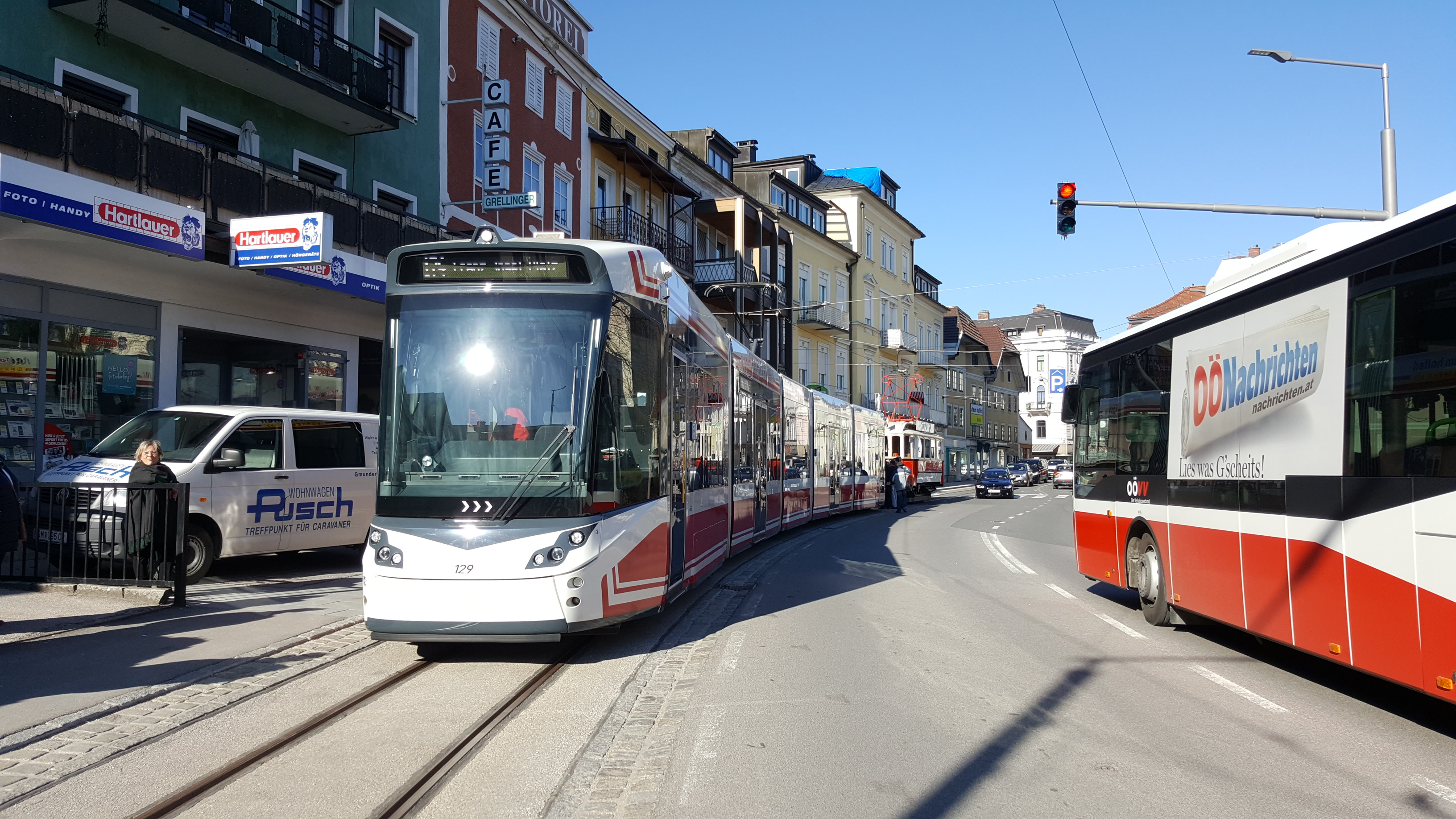 Stadt.Regio.Tram Gmunden Vorchdorf